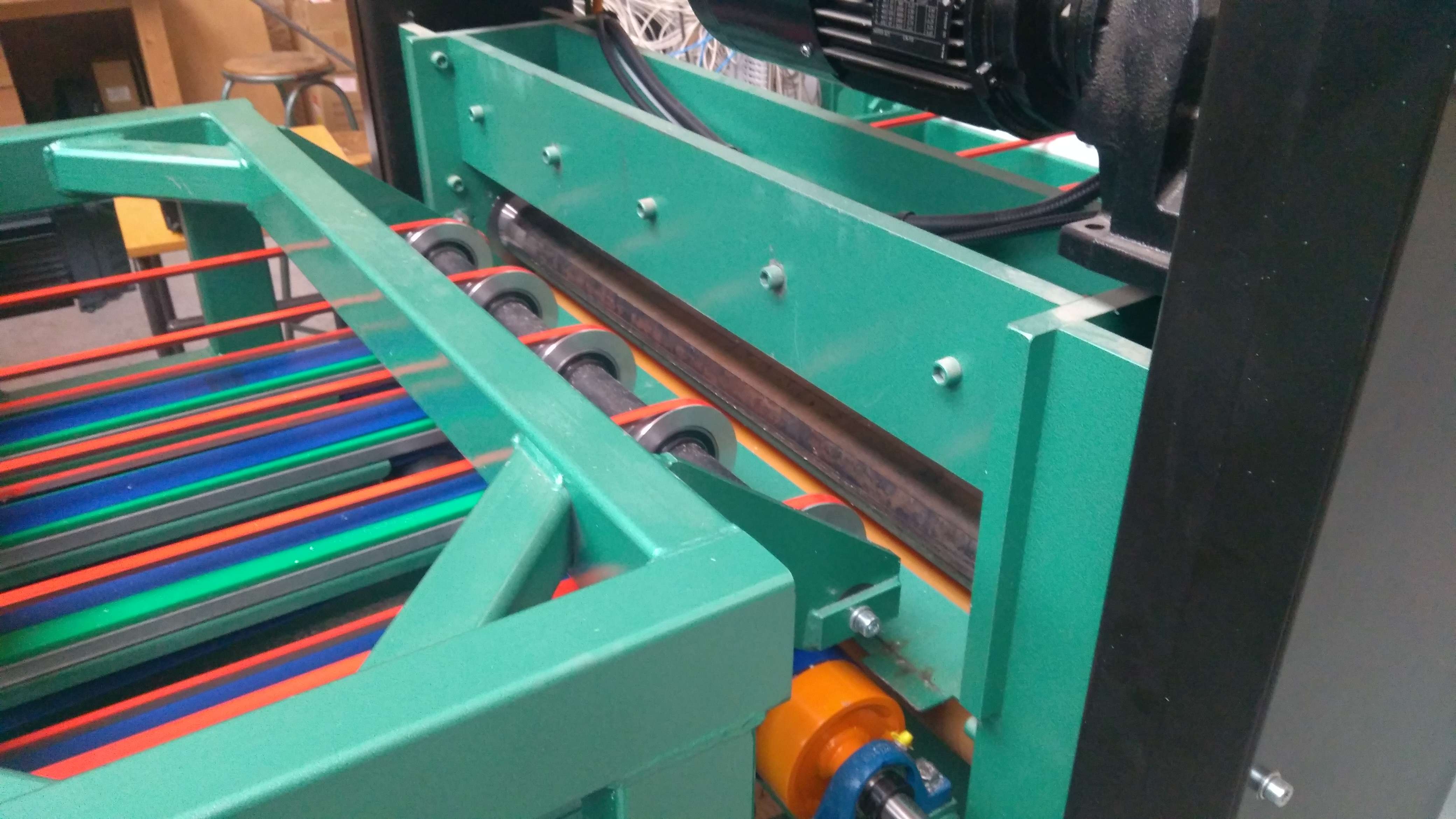 L'avance du placage est mesurée par une roulette liée à un codeur. Le massicot est commandé pour couper les placages à la longueur définie par l'utilisateur. Il effectue une demi rotation à chaque coupe.